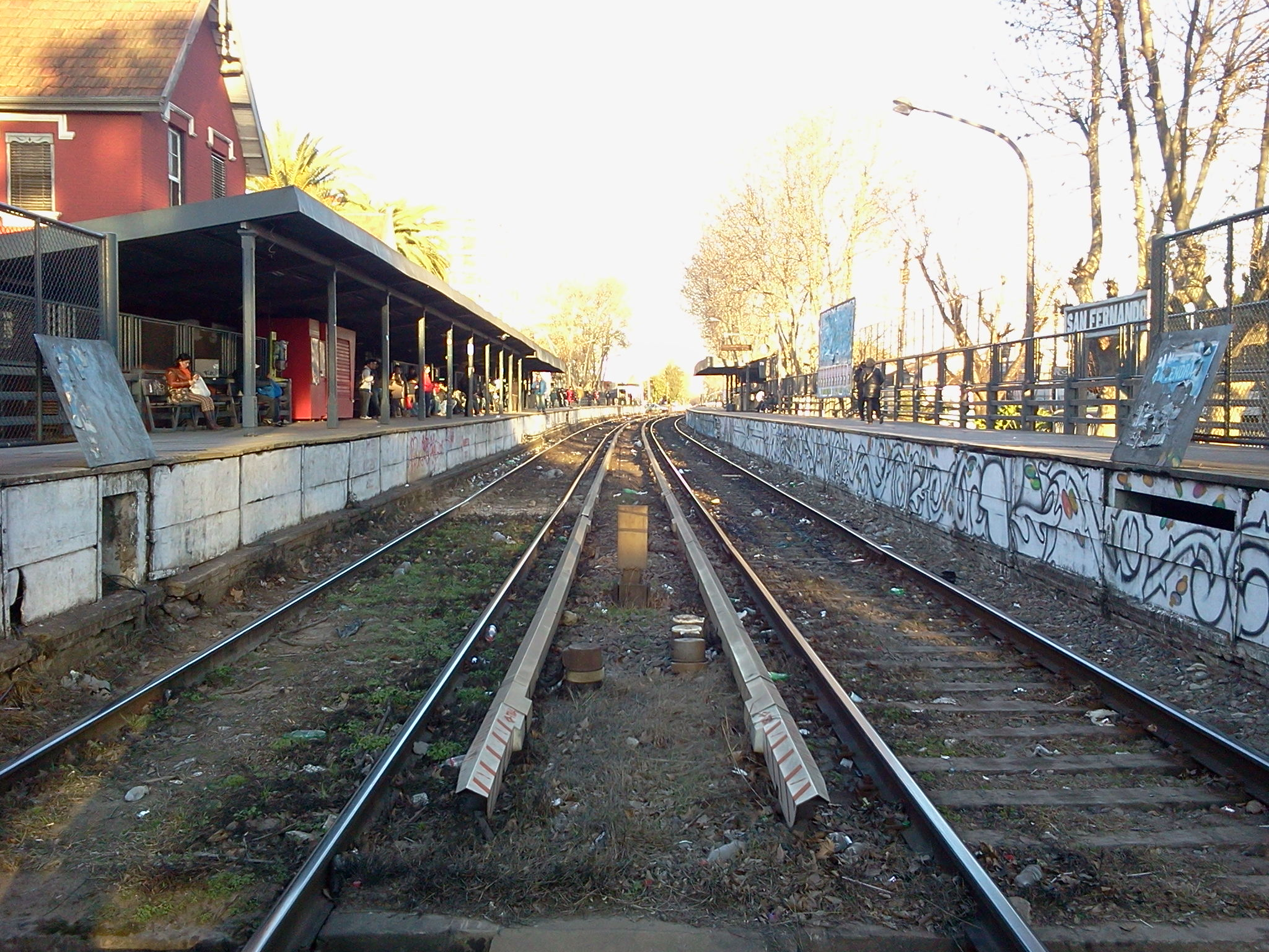 Andenes